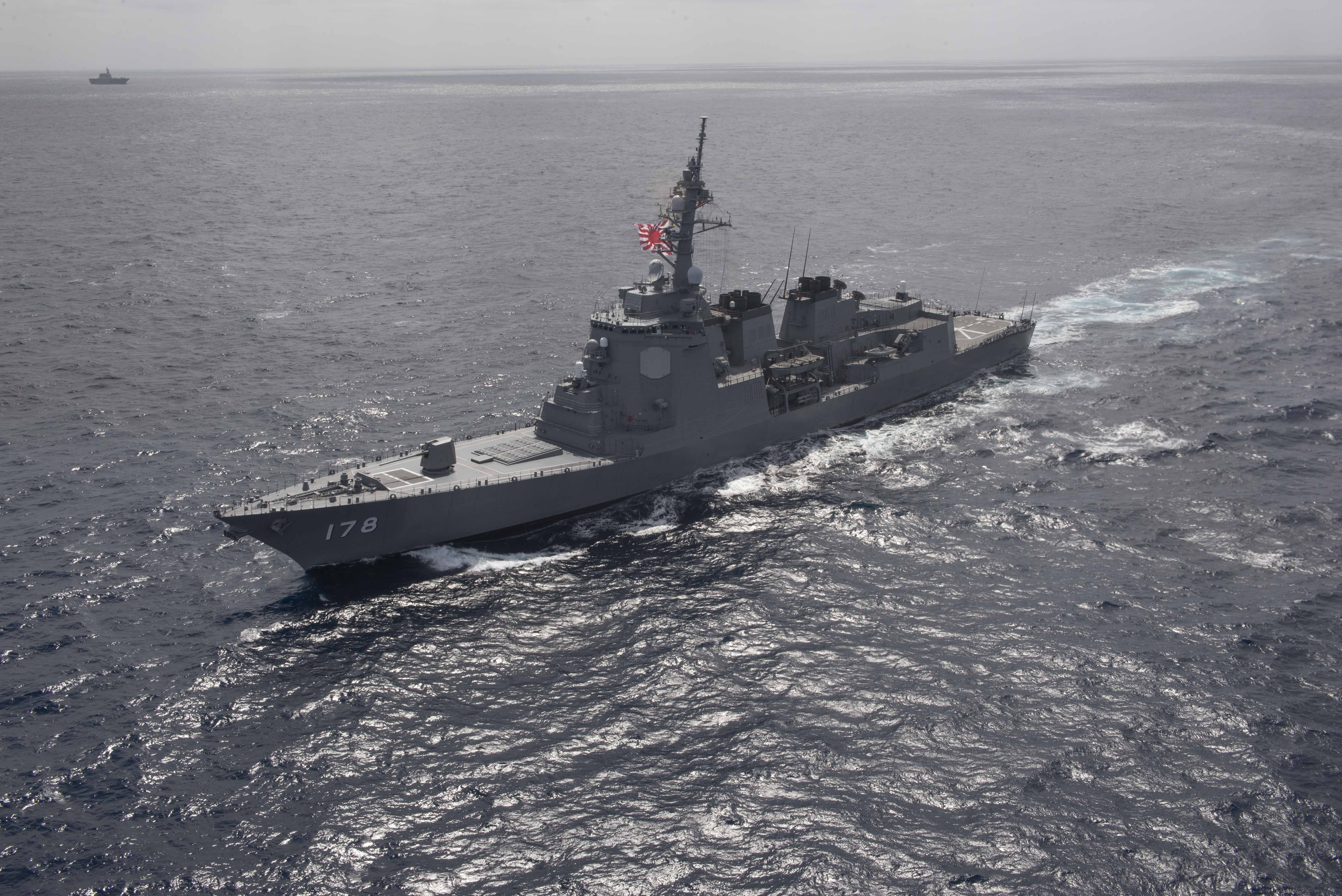 多国間統合演習「ドーン・ブリッツ2015」で太平洋を航行する護衛艦あしがら。